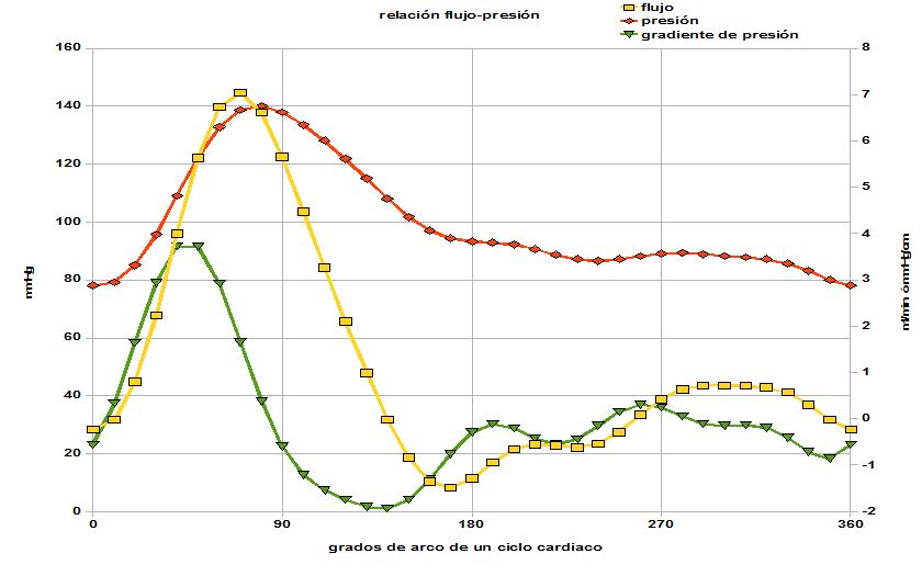 curvas de flujo presion y gradiente de presion arterial